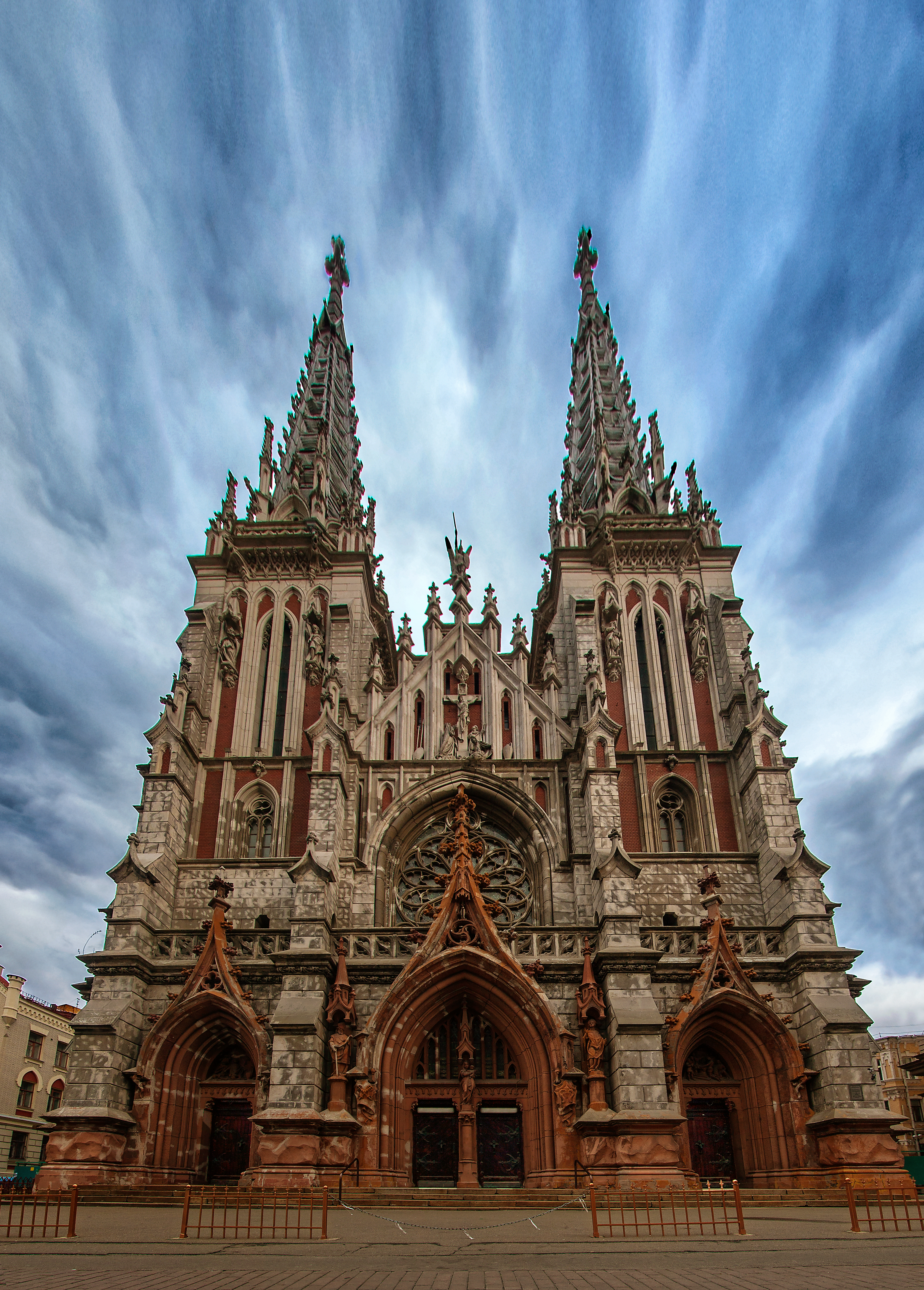 Костьол св. Миколая, Київ, Червоноармійська вул., 77